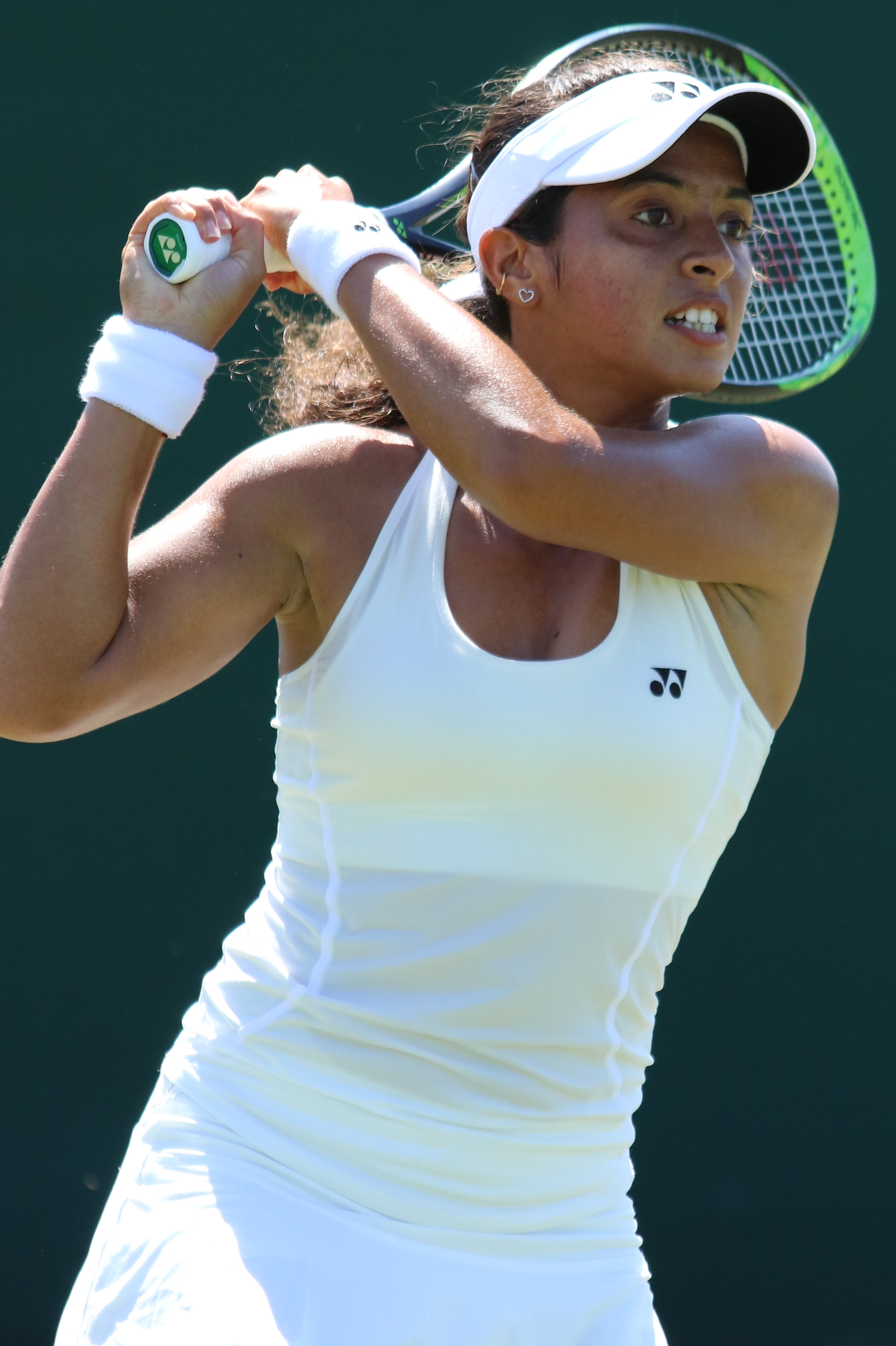 Raina WMQ18 (21)